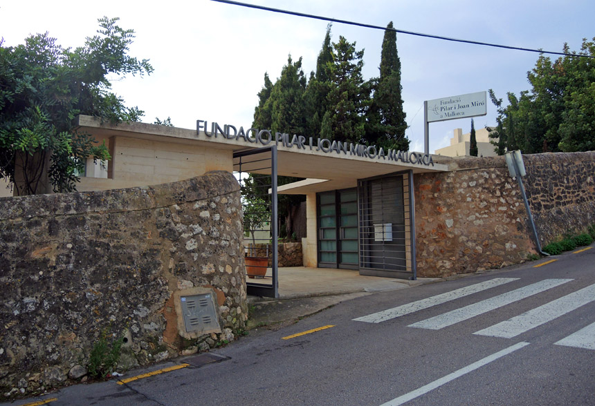 Eingang zur Fundacio Pilar i Joan Miró in Palma de Mallorca